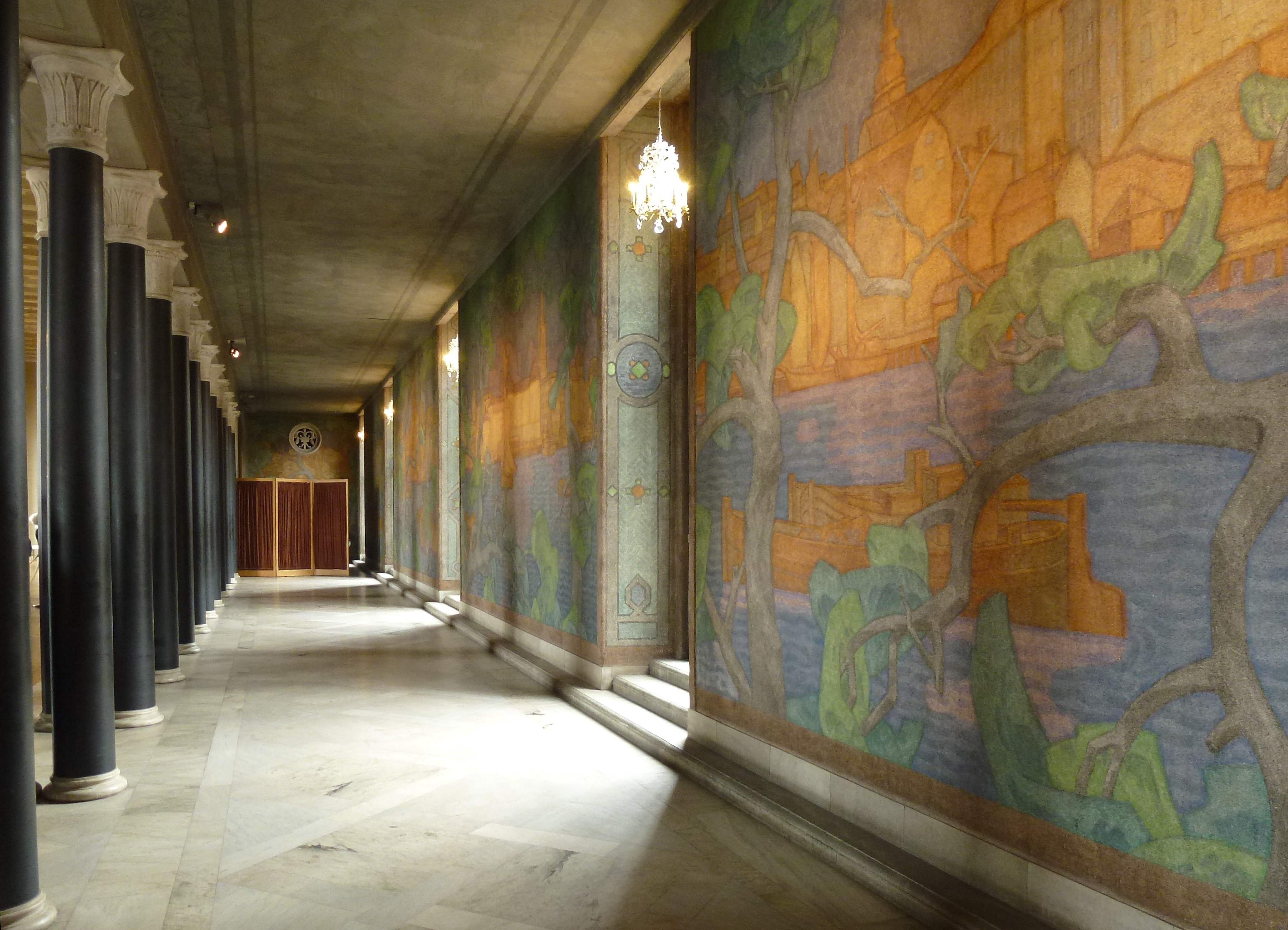 Prinsens galleri Stadshuset, vägg mot borgargården